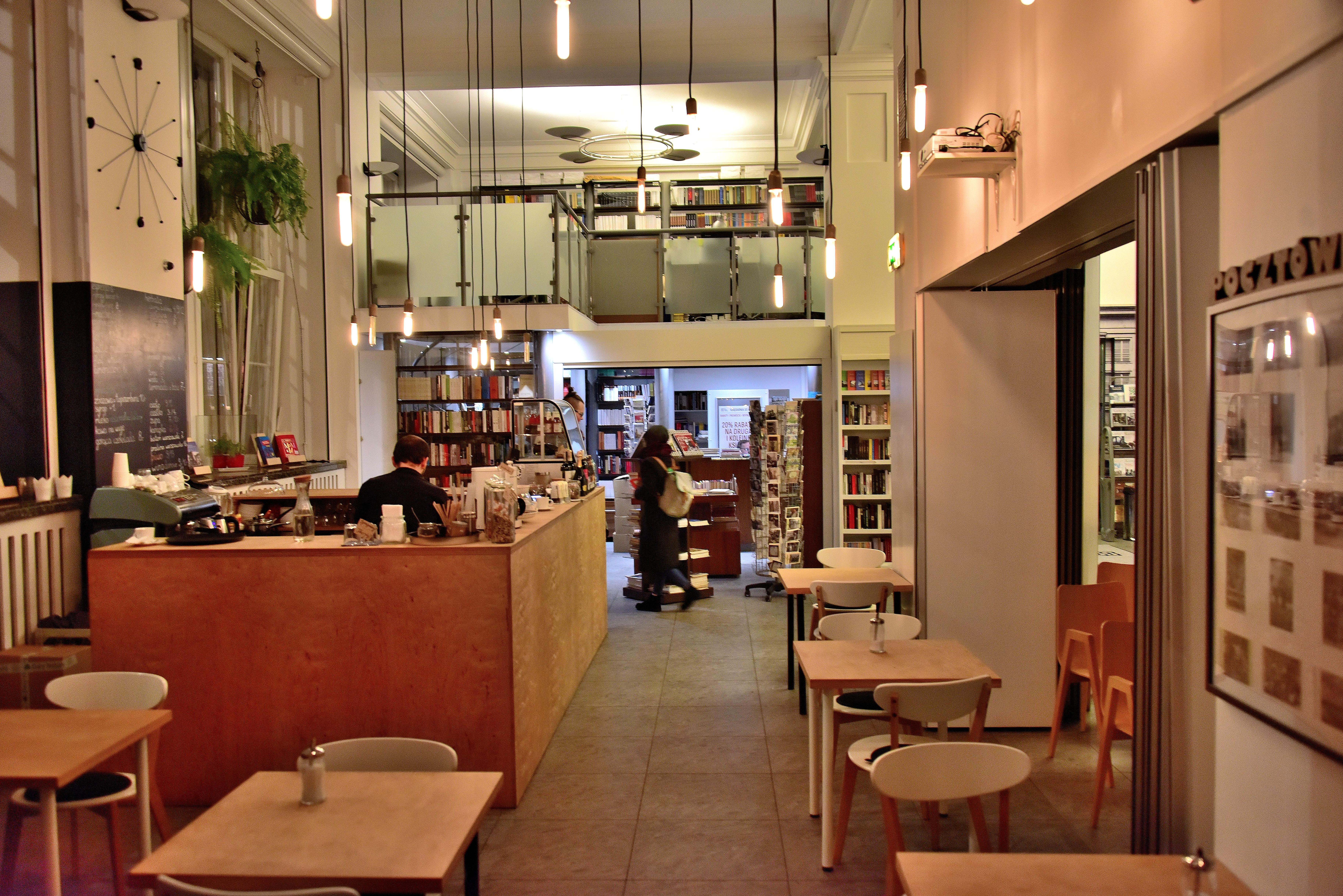 Kawiarnia i księgarnia w Domu Spotkań z Historią w Warszawie